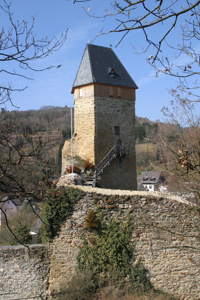 Wiesbaden, Burguine Frauenstein, selbst fotografiert